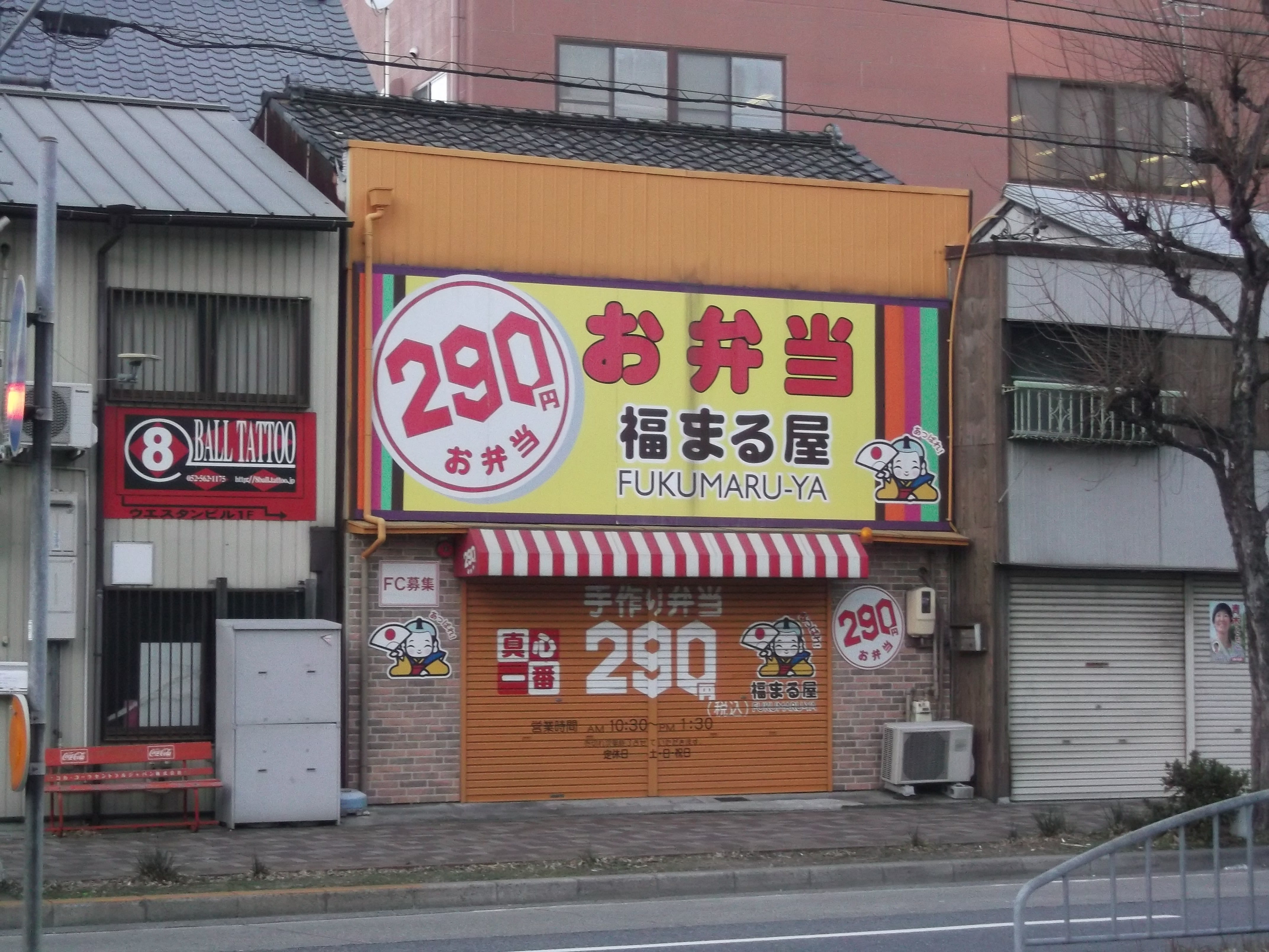 名古屋市西区菊井にある弁当店「福まる屋菊井店」を南側から写す